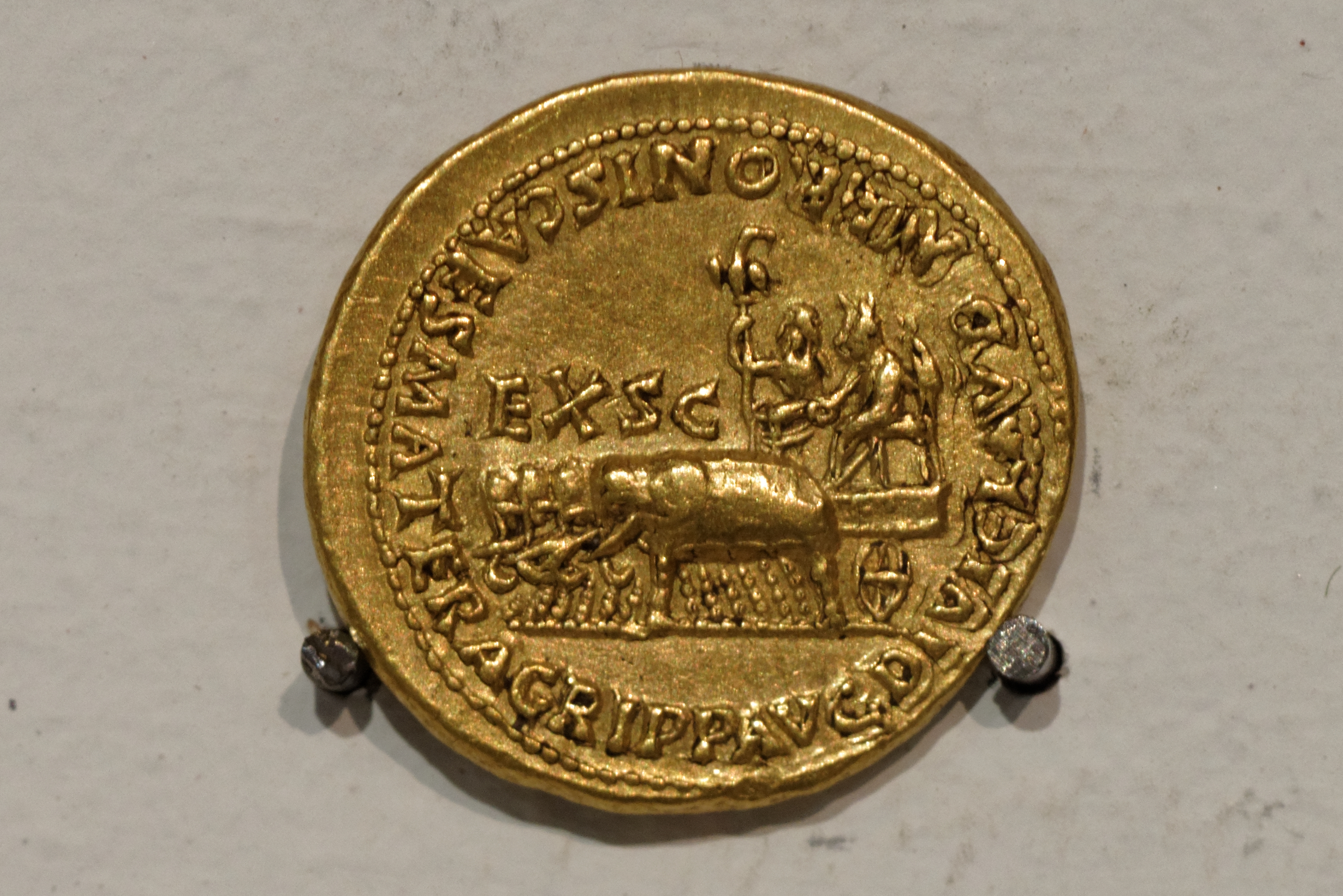 Aureus émis en 55 ap. J.-C., type MacDowall 3 D/ NERO CLAVD DIVI F CAES AVG GERM IMP TR P COS Buste d'Agrippine et tête de Néron accolés R/ AGRIPP AVG DIVI CLAVD NERONIS CAES MATER EX S C. Char de Claude divinisé tiré par quatre éléphants ; à ses cotés un personnage féminin assis, peut-être la Fides praetorianum selon le numismate Jean-Baptiste Giard (p 80, Le monnayage de l'Atelier de Lyon, 2000). Musée des Beaux-Arts de Lyon, inv. X 618-15